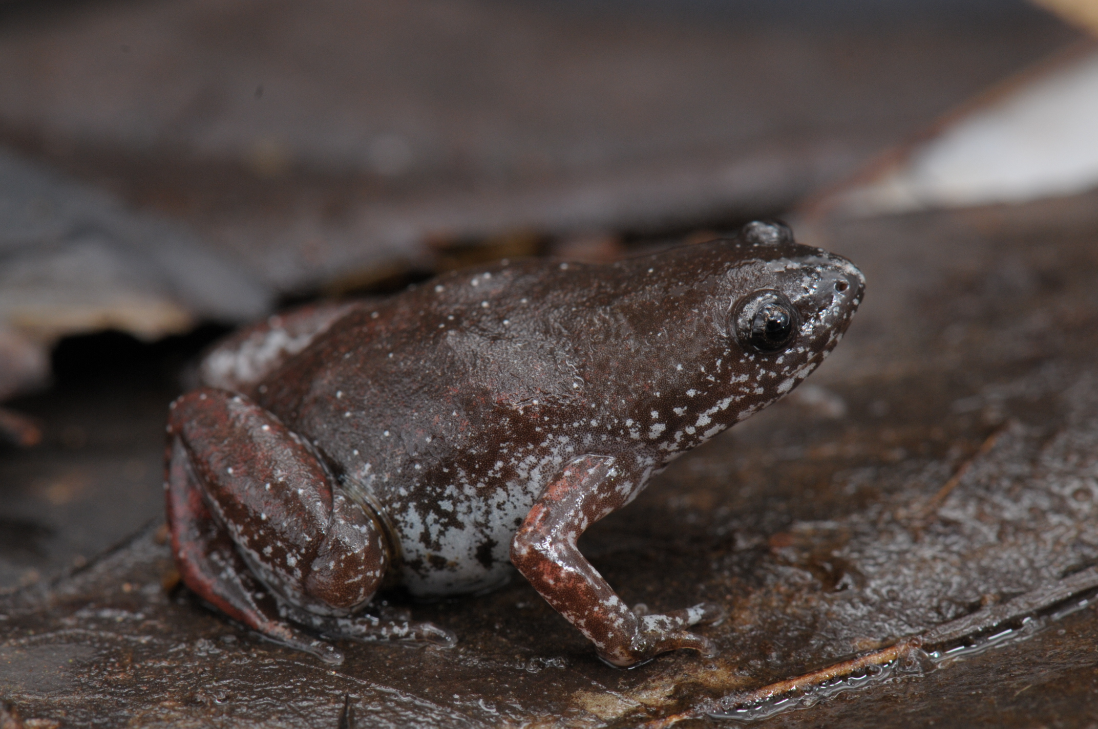 Rãzinha - Chiasmocleis leucosticta - Espécie encontrada nas florestas atlânticas, a imagem foi registrada na Bahia.